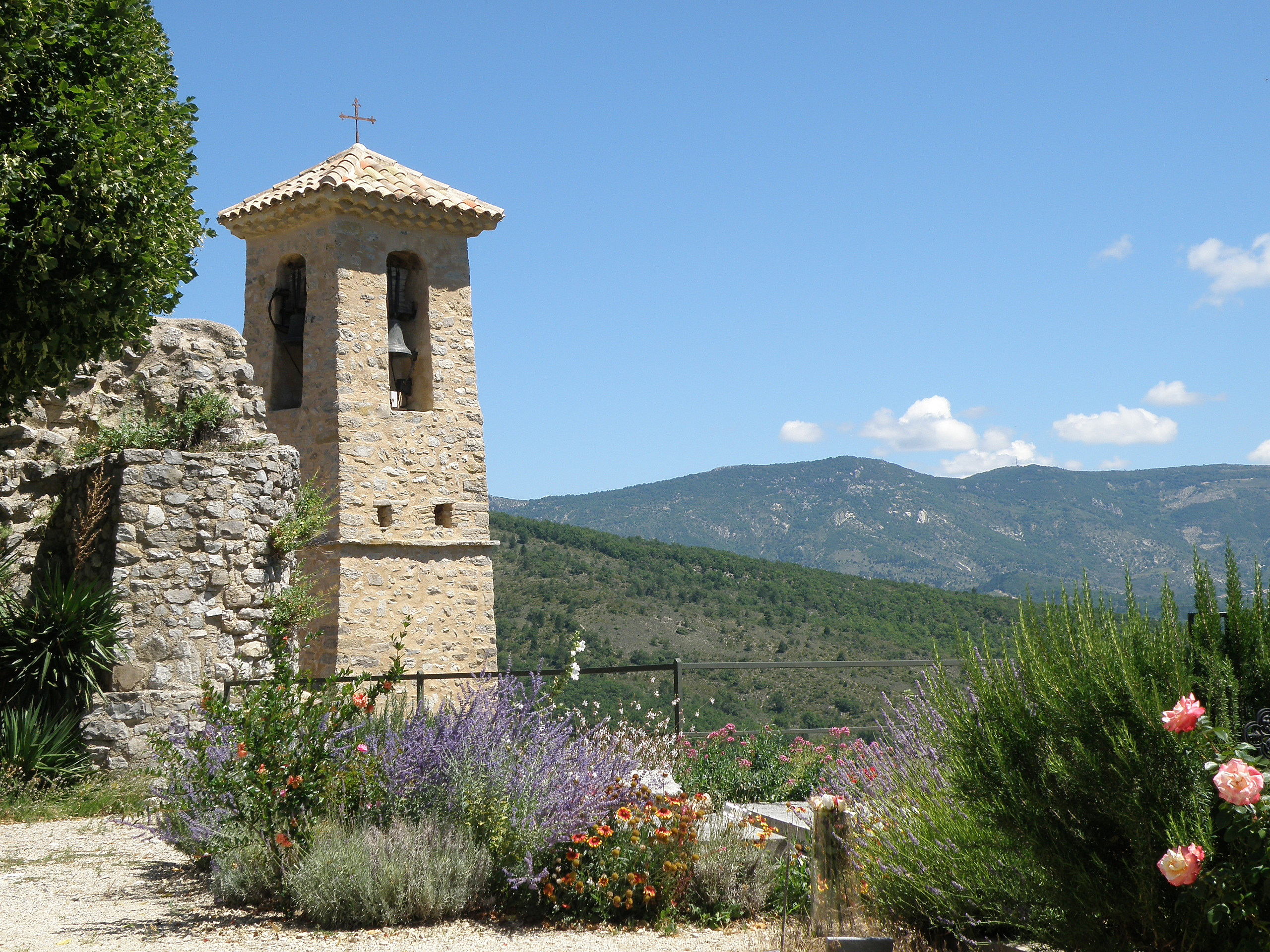 Rochebrune (Drôme). Église Saint-Michel.